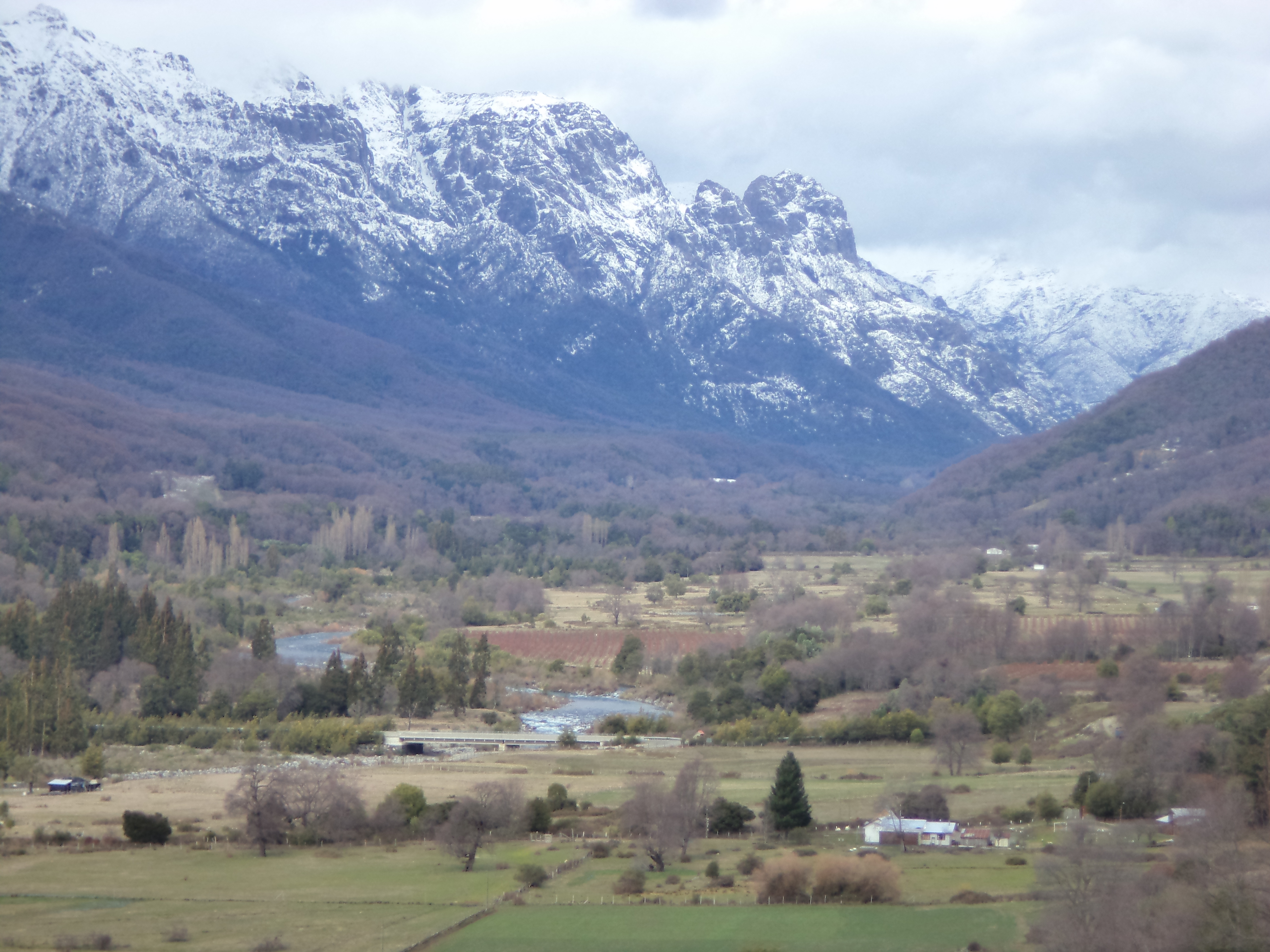 Corresponde a un territorio bi regional cordillerano declarado por la UNESCO como Reserva de la Biosfera y esta conformado por las comunas de San Fabián, Coihueco, Pinto, El Carmen, Yungay, Antuco y Tucapel, donde las primeras cinco comunas son de la Región de Ñuble y las otras dos pertenecen a la Región del Bío - Bío en Chile